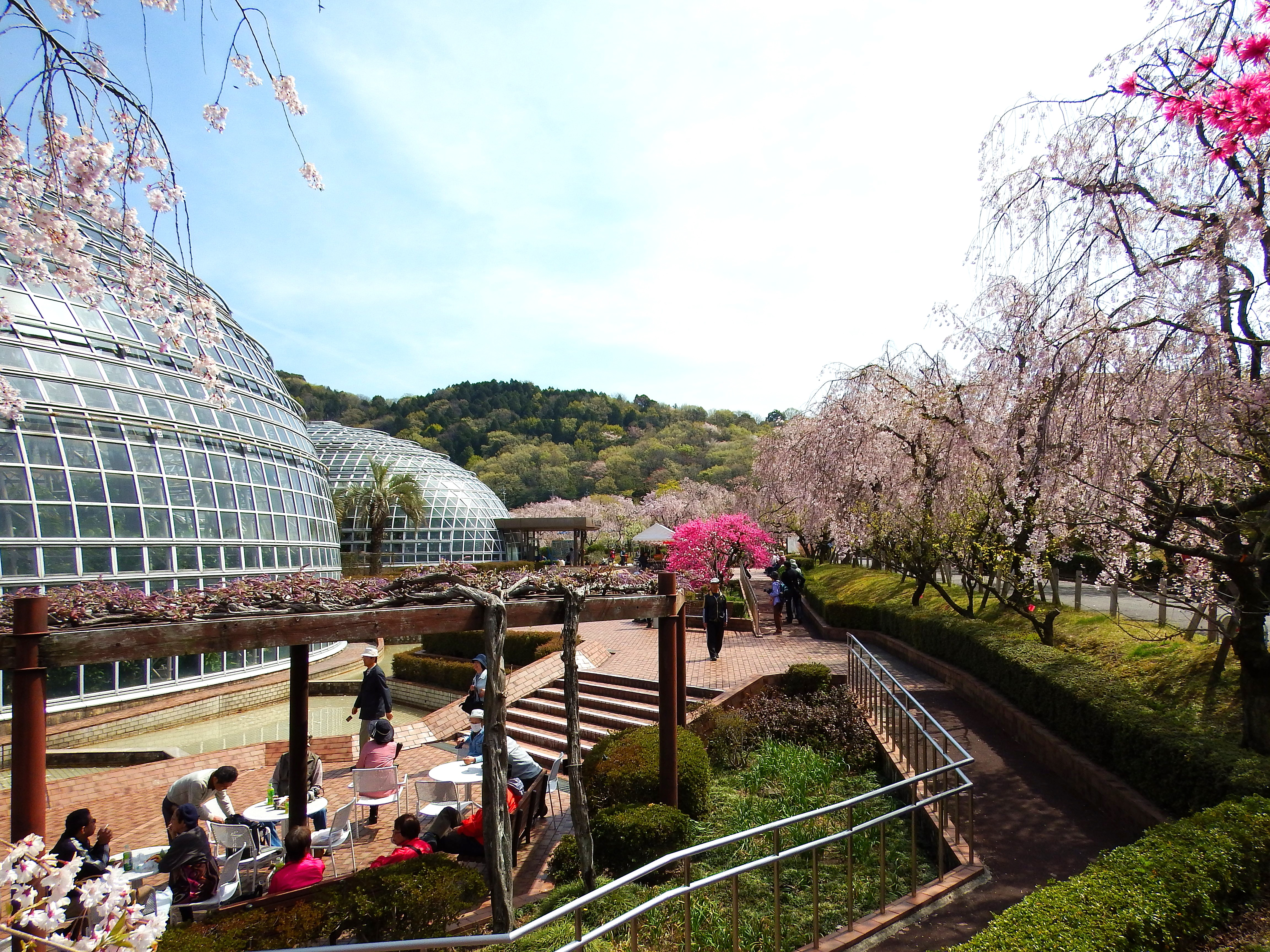 シダレザクラと世界の熱帯果樹温室